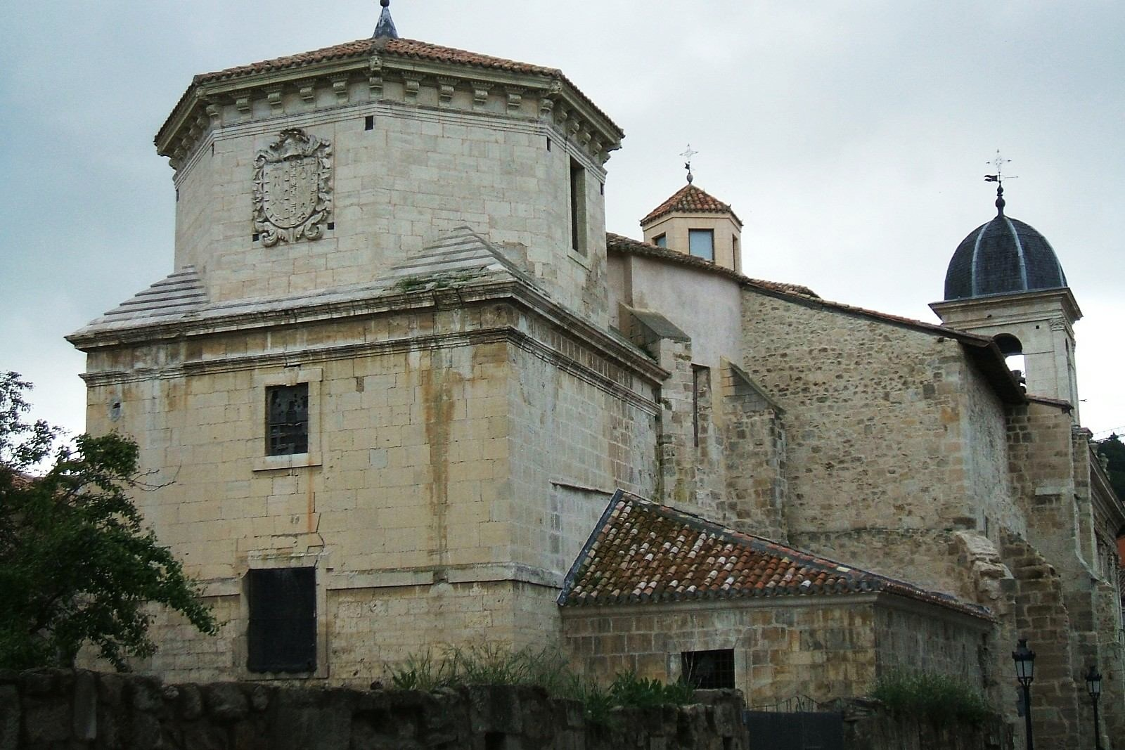 Aspecto exterior de la Capilla del Sagrario, en la cabecera de la Colegiata de Santa María la Mayor, Briviesca, Burgos, Castilla y León, España